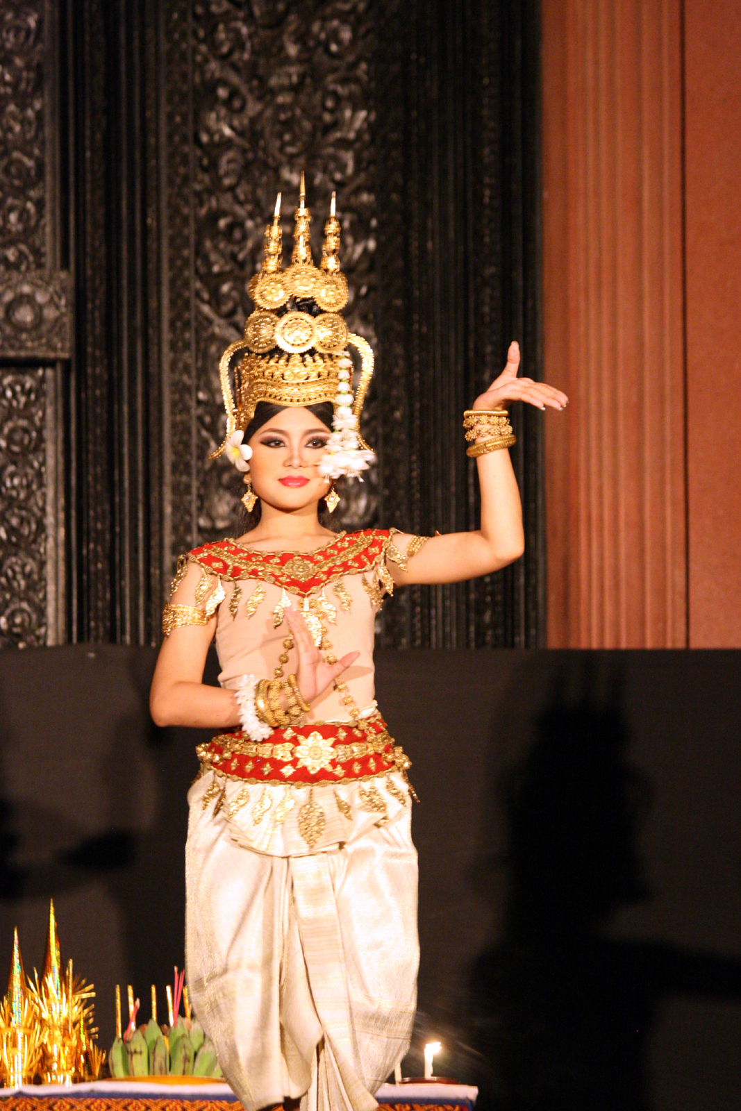 Spectacle des Enfants du Bassac à Phnom Penh